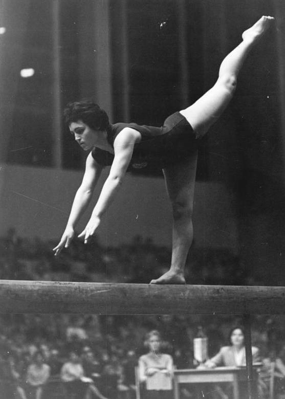 Karin Boldemann Zentralbild Zastrow 13.1.1960 Spitzensportlerinnen der DDR im Turnen UBz: Karin Boldemann (SC Dynamo Berlin).